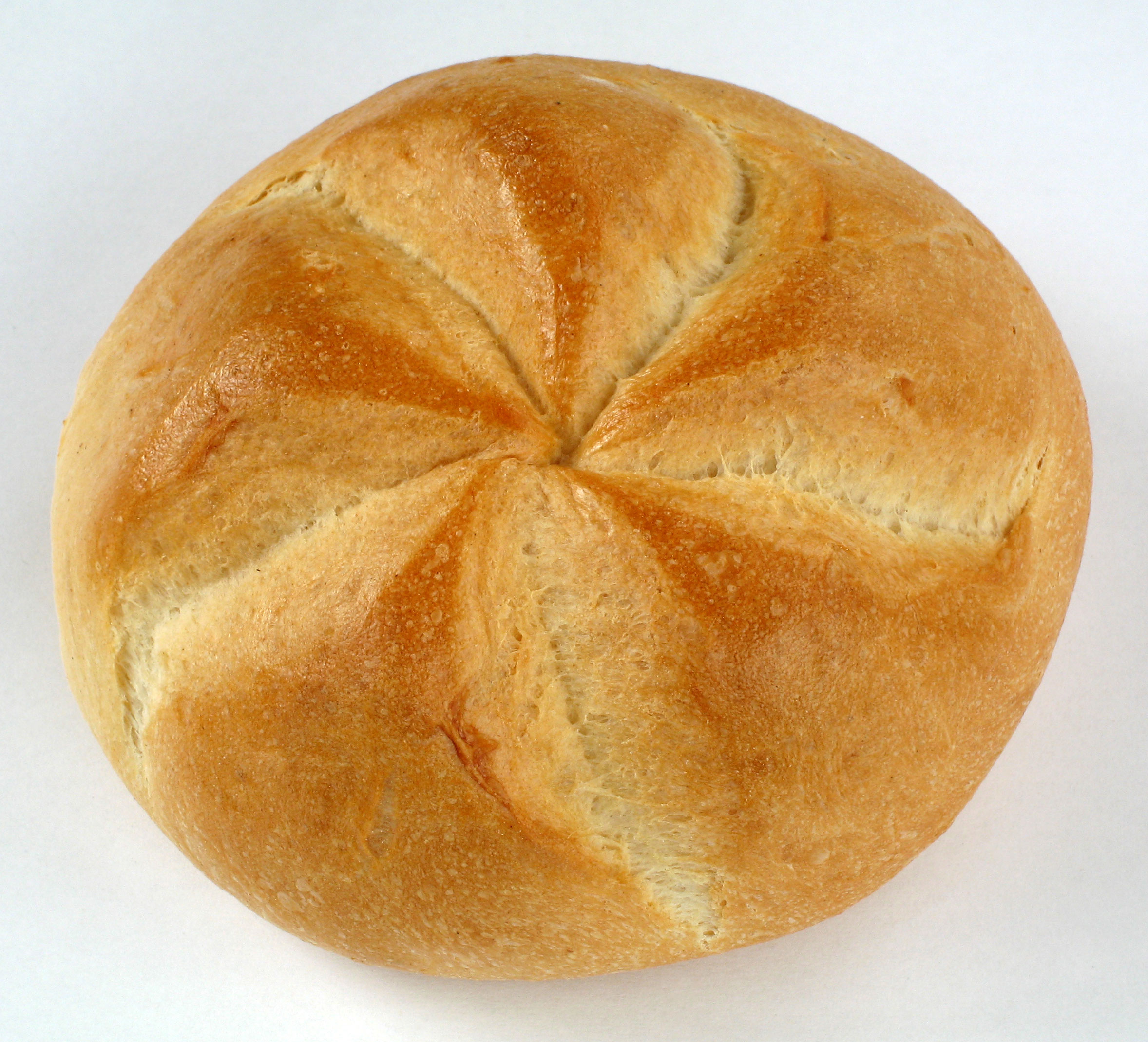 Kaisersemmel (Maschinensemmel)